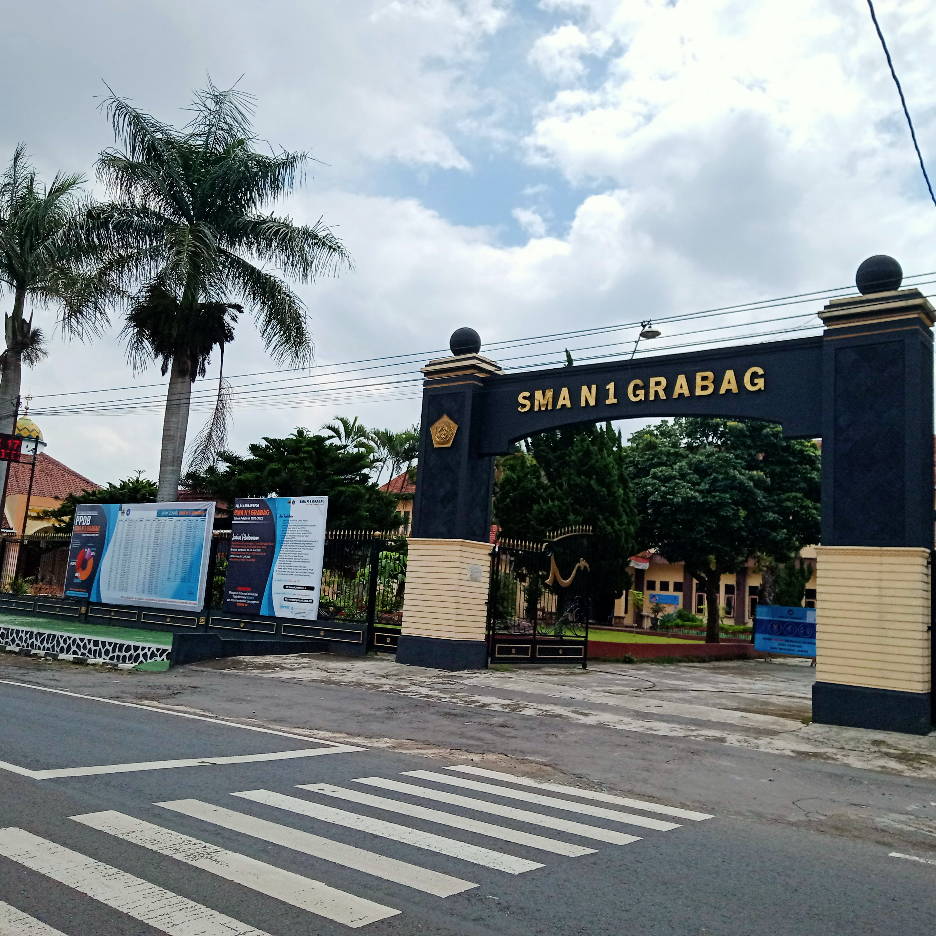 SMA Negeri 1 Grabag Magelang